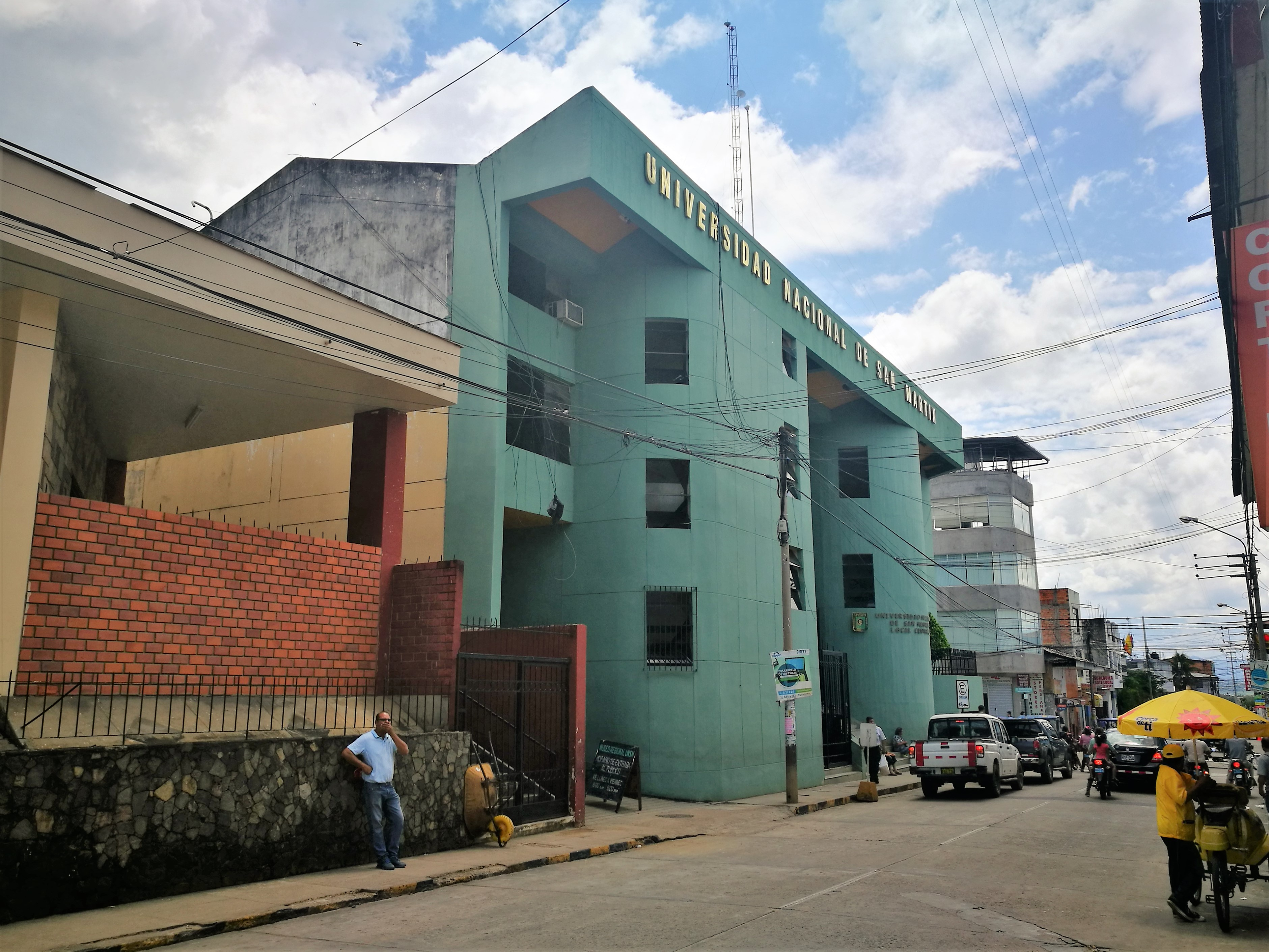 Edifici central de la Universidad Nacional de San Martín a Tarapoto